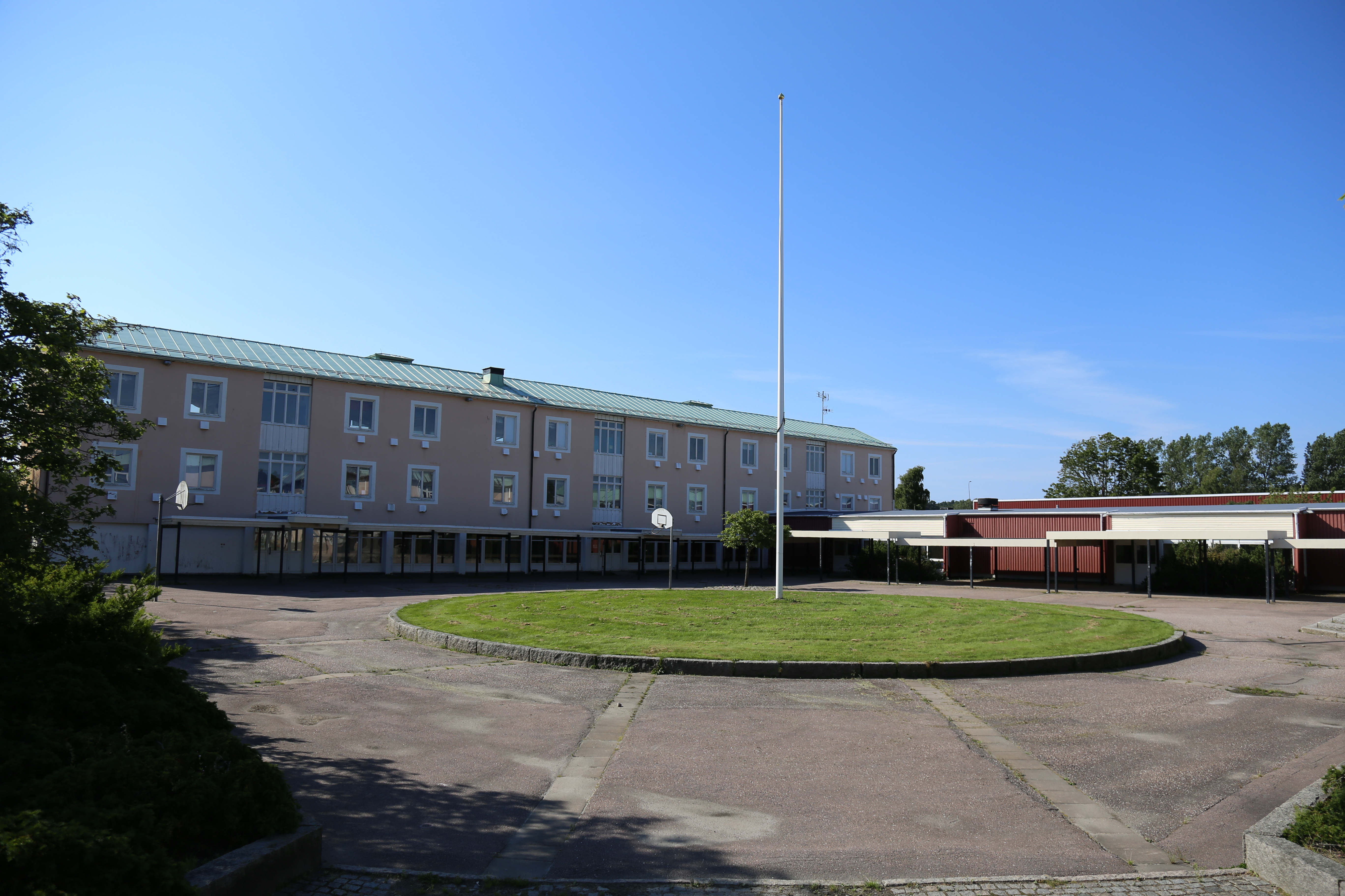 Thorildskolan i Kungälv.